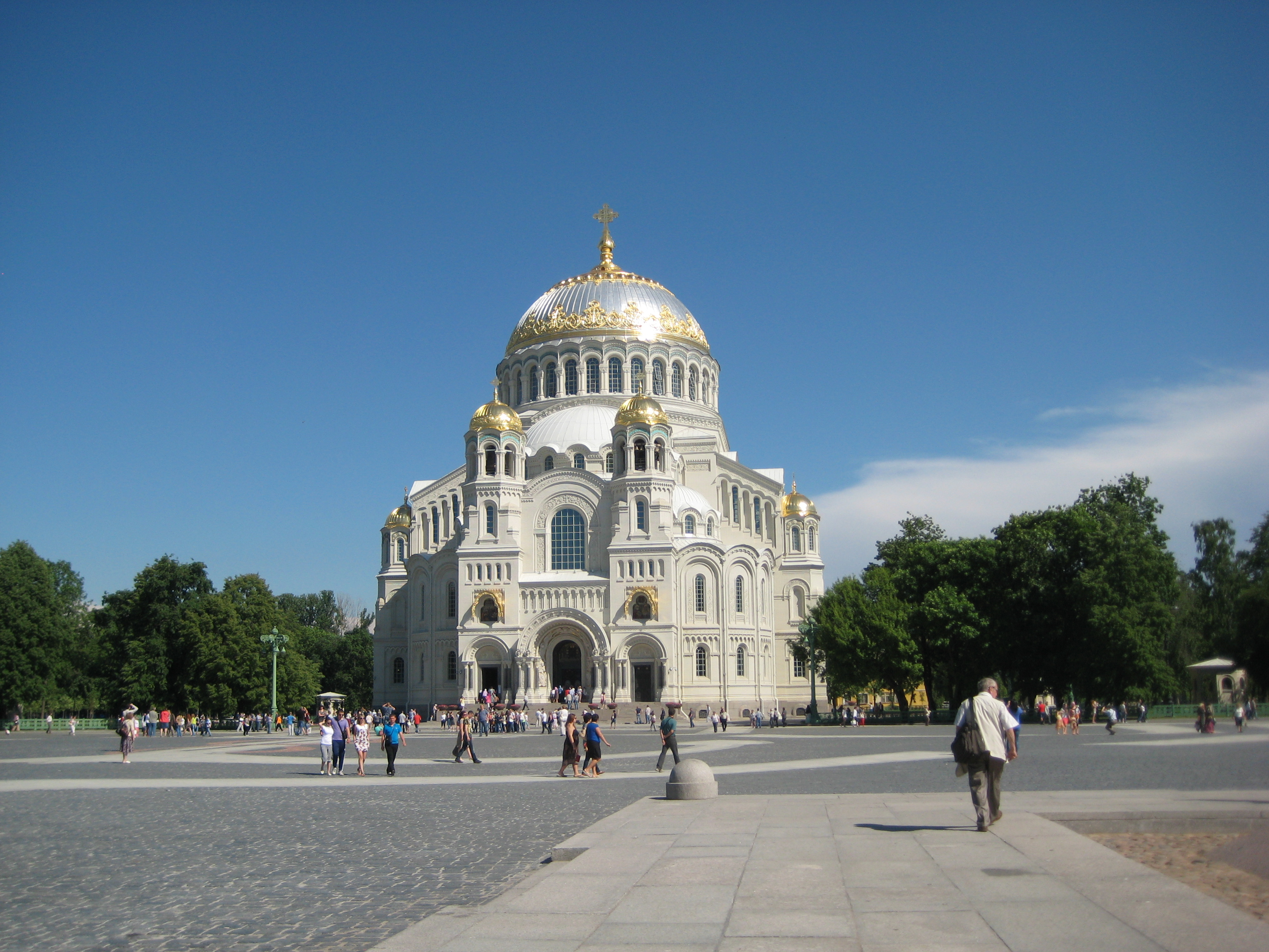 Кронштадт. Морской собор.